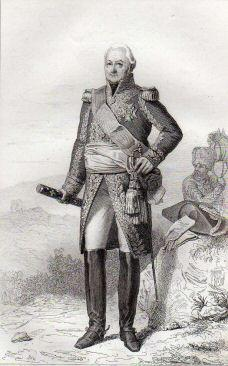 ArtistPortrait dessiné par Delaval et gravé par BoillyTitle